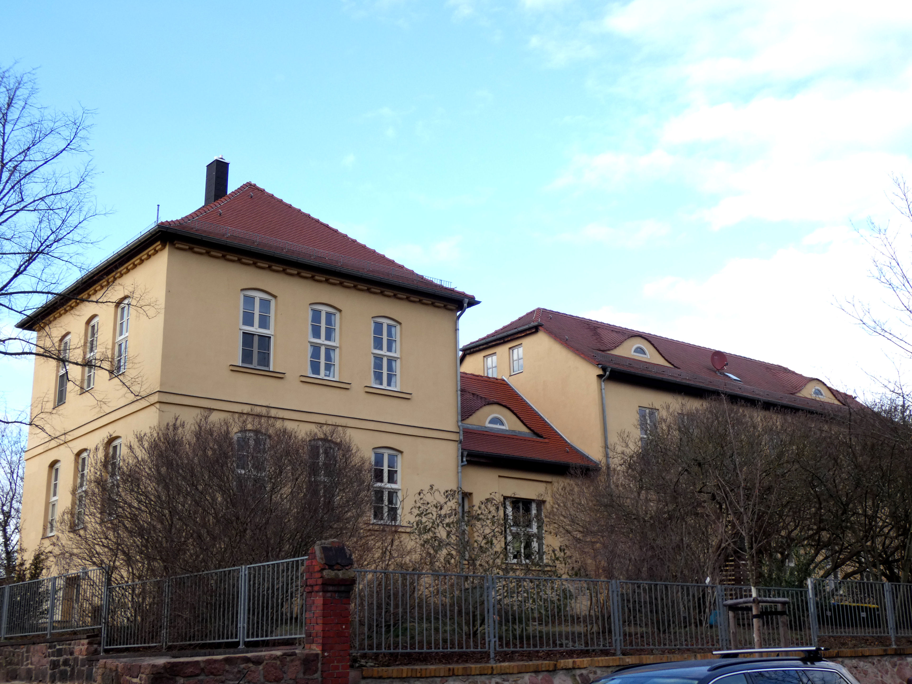 Villa Friedenstraße 1e, Halle (Saale)